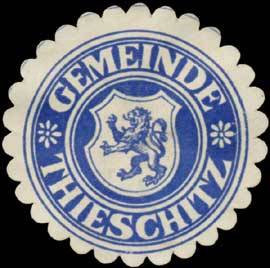 Sealing stamp Title: Gemeinde Thieschitz Description: blau, weiß Place: Thieschitz size: 4 cm